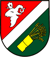 Wappen der Gemeinde Kumberg in Österreich